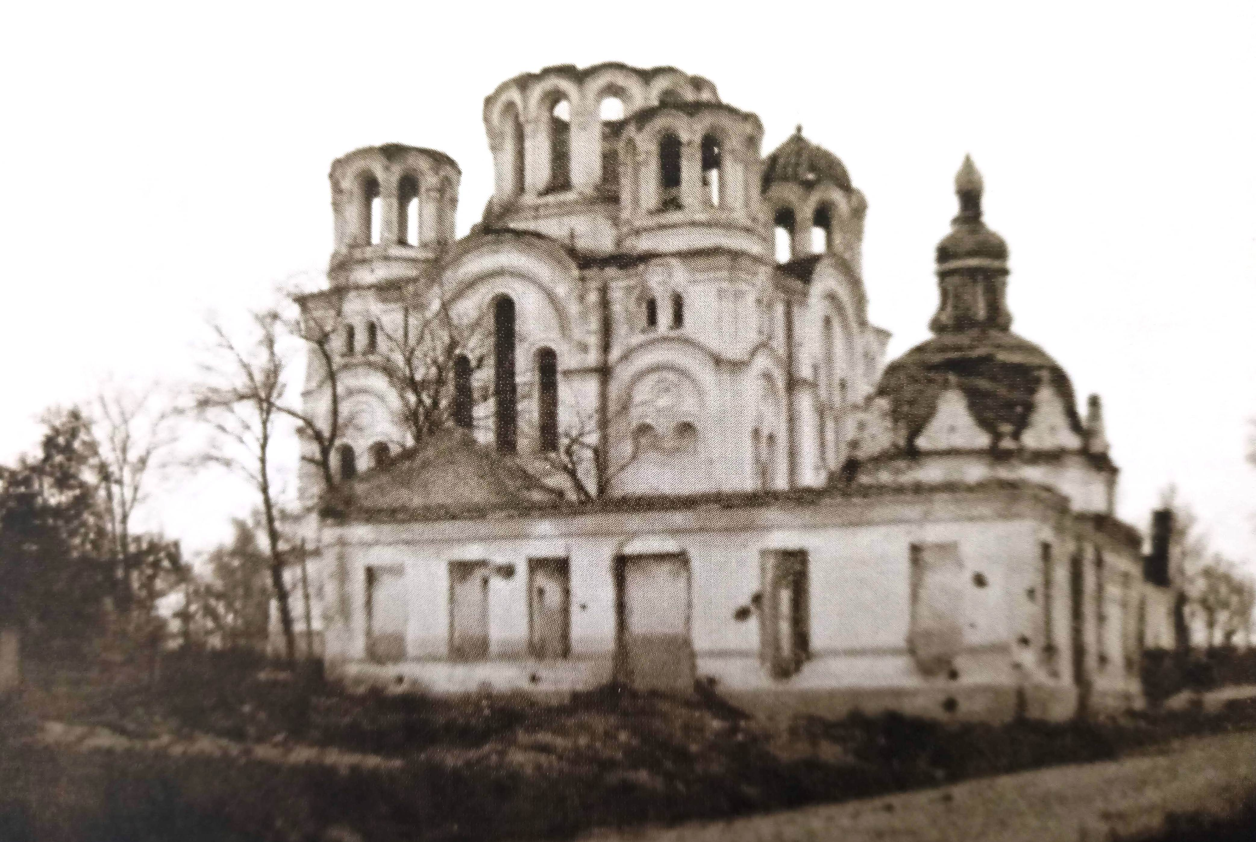 Трьоханастасіївська церква та Анастасіївська каплиця (справа) 1943 р.